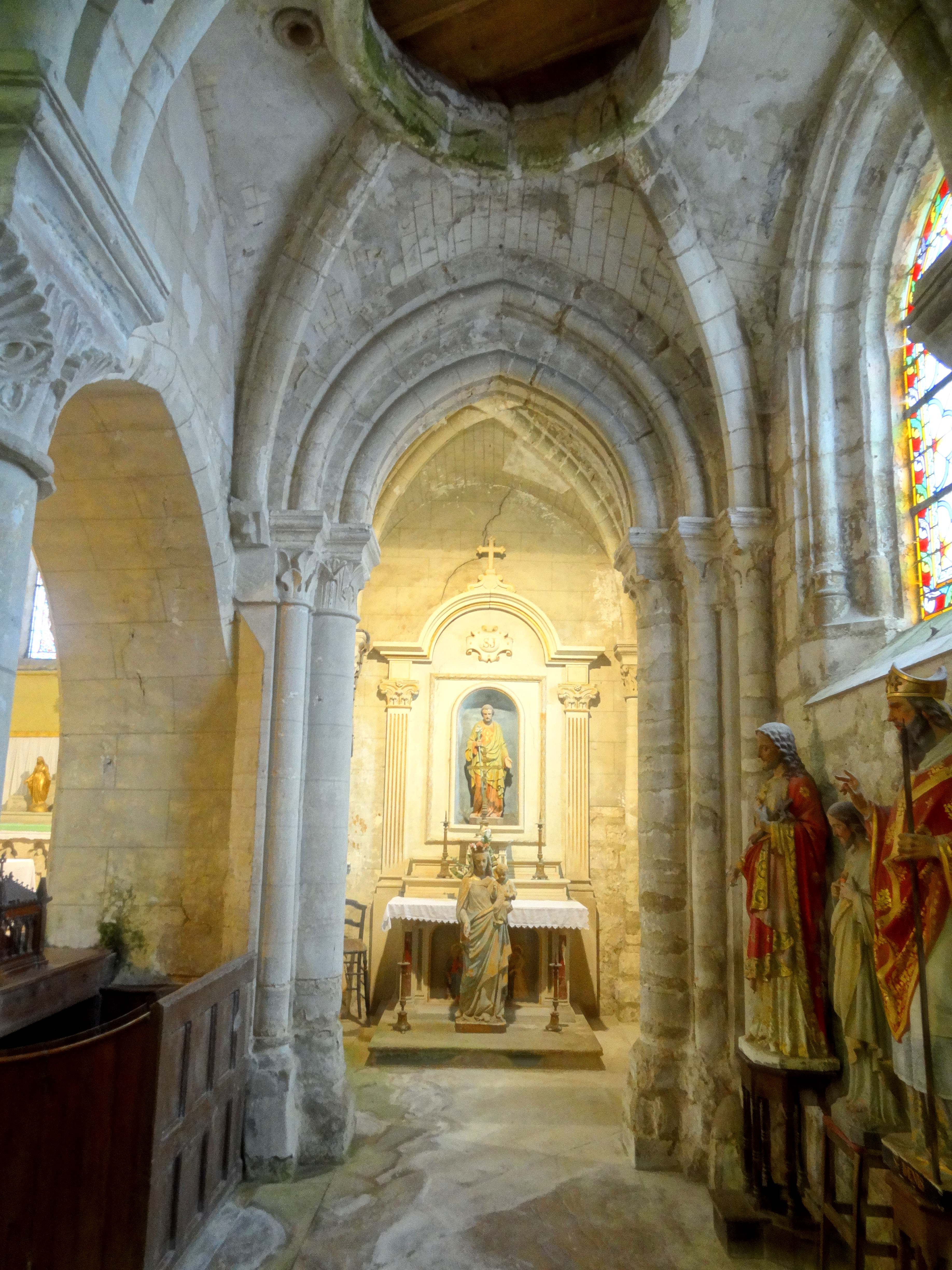 Intérieur de l'église - voir titre.